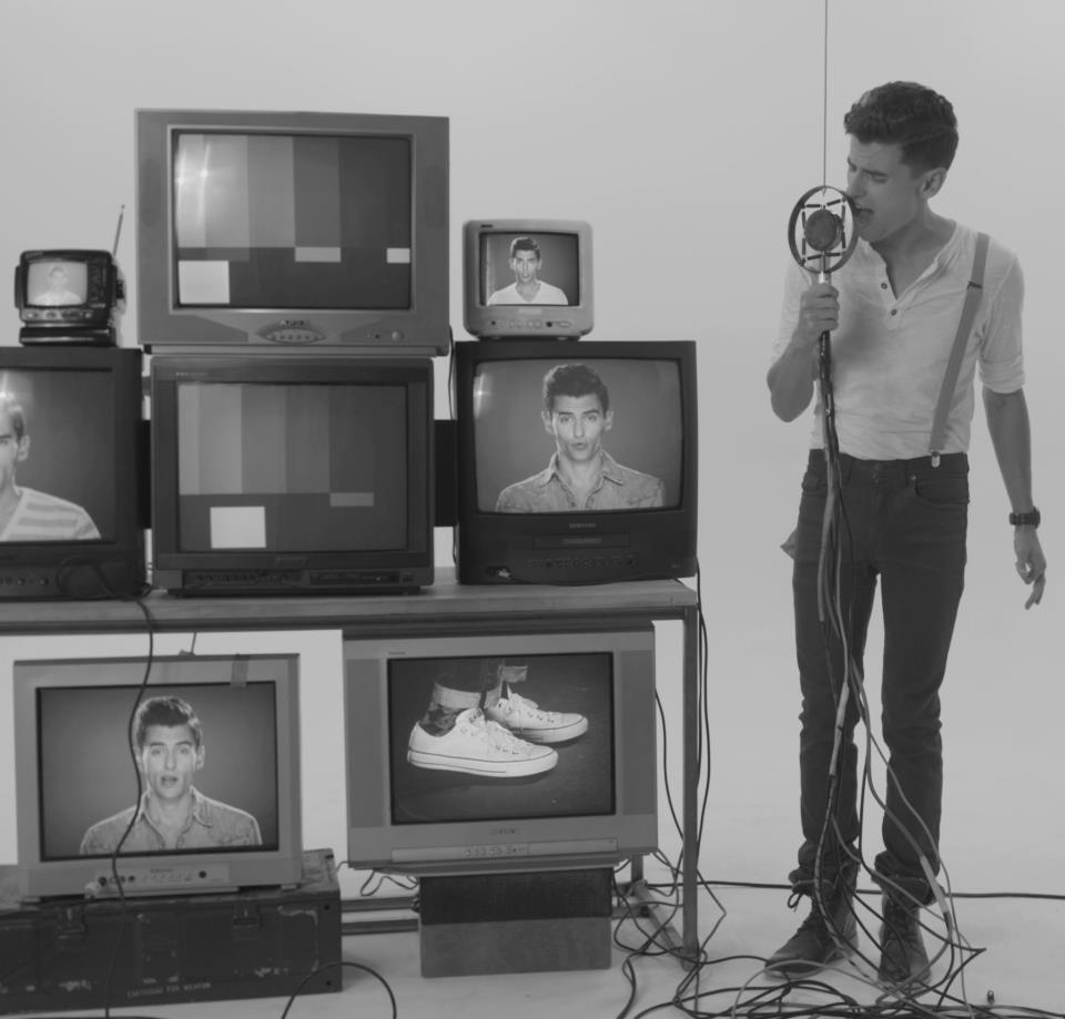 Մայք Թոմփքինս